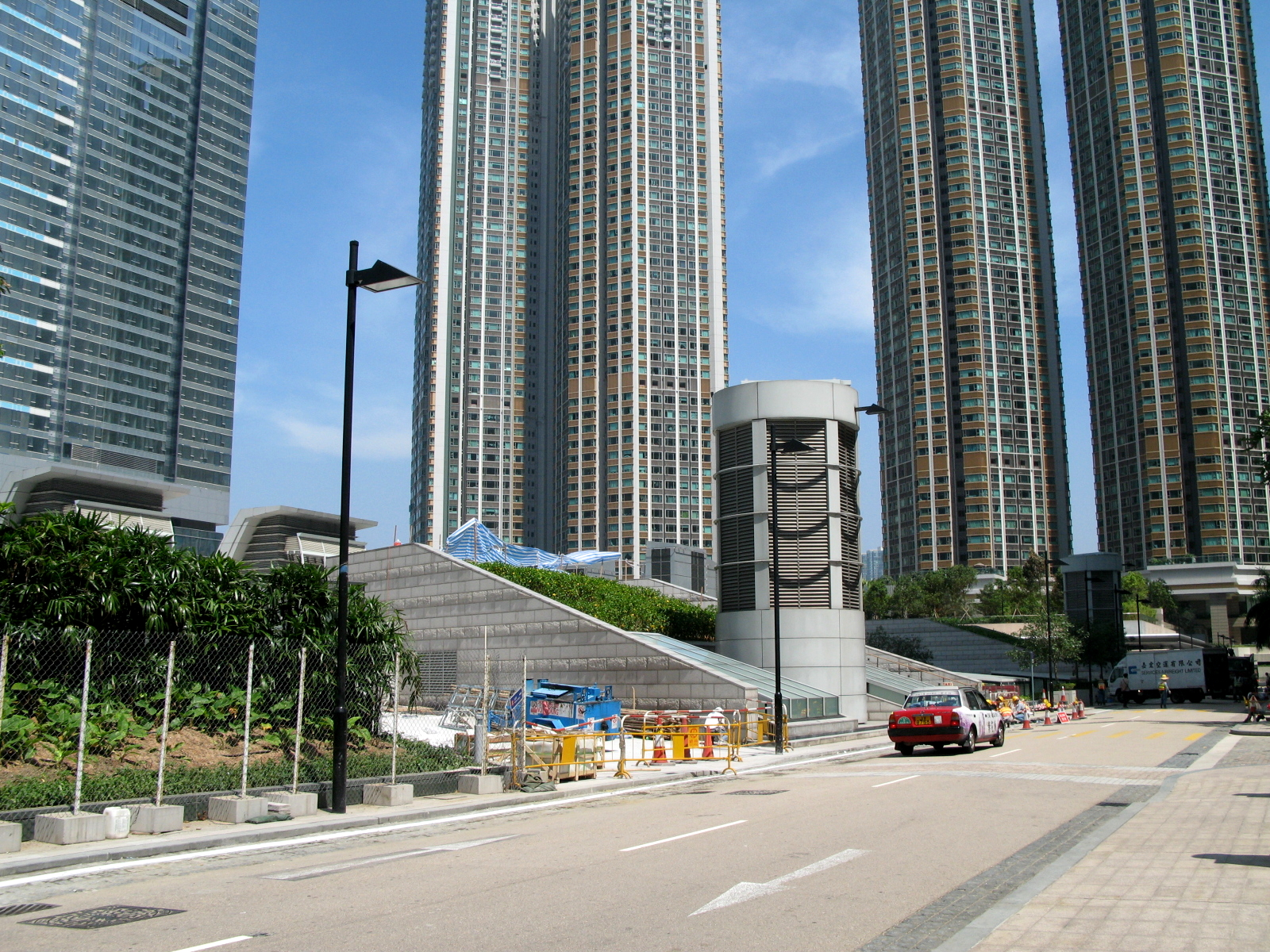 HK Union Sqaure